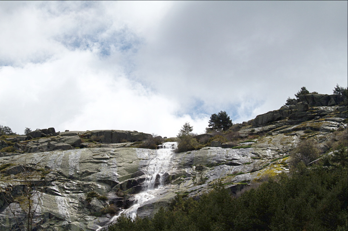 Vista del Chorro Grande, a medio camino de subida. Segovia.